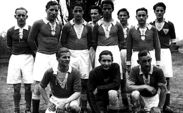 Die Ligamannschaft des VfL Oldeslo 1950 vor dem Spiel beim MTV Lübeck. Trainer Erwin Seeler (oben - 2.ter von links) lief in einem Alter von 41 Jahren noch als Spieler auf. Die Personen auf dem Bild: Die Ligamannschaft am 29.4.1951 Hinten: Hans Feddern, Erwin Seeler, Heinz Richter, Georg Wrobel, Günter Freidrich, Werner Kneese, Heinz Pohl, Hermann Lattke Vorn: Helmut Lange, Heinz Lange, Ernst Hahn Foto: Stäcker